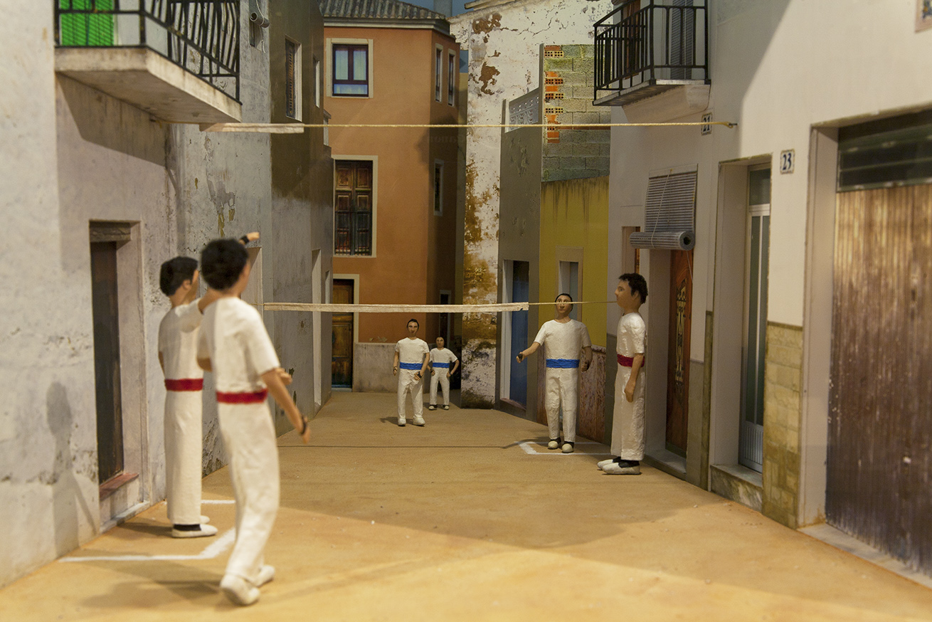 Fotografies d'Hèctor Juan de l'exposició temporal del Museu Valencià d'Etnologia "Faixa roja, faixa blava".